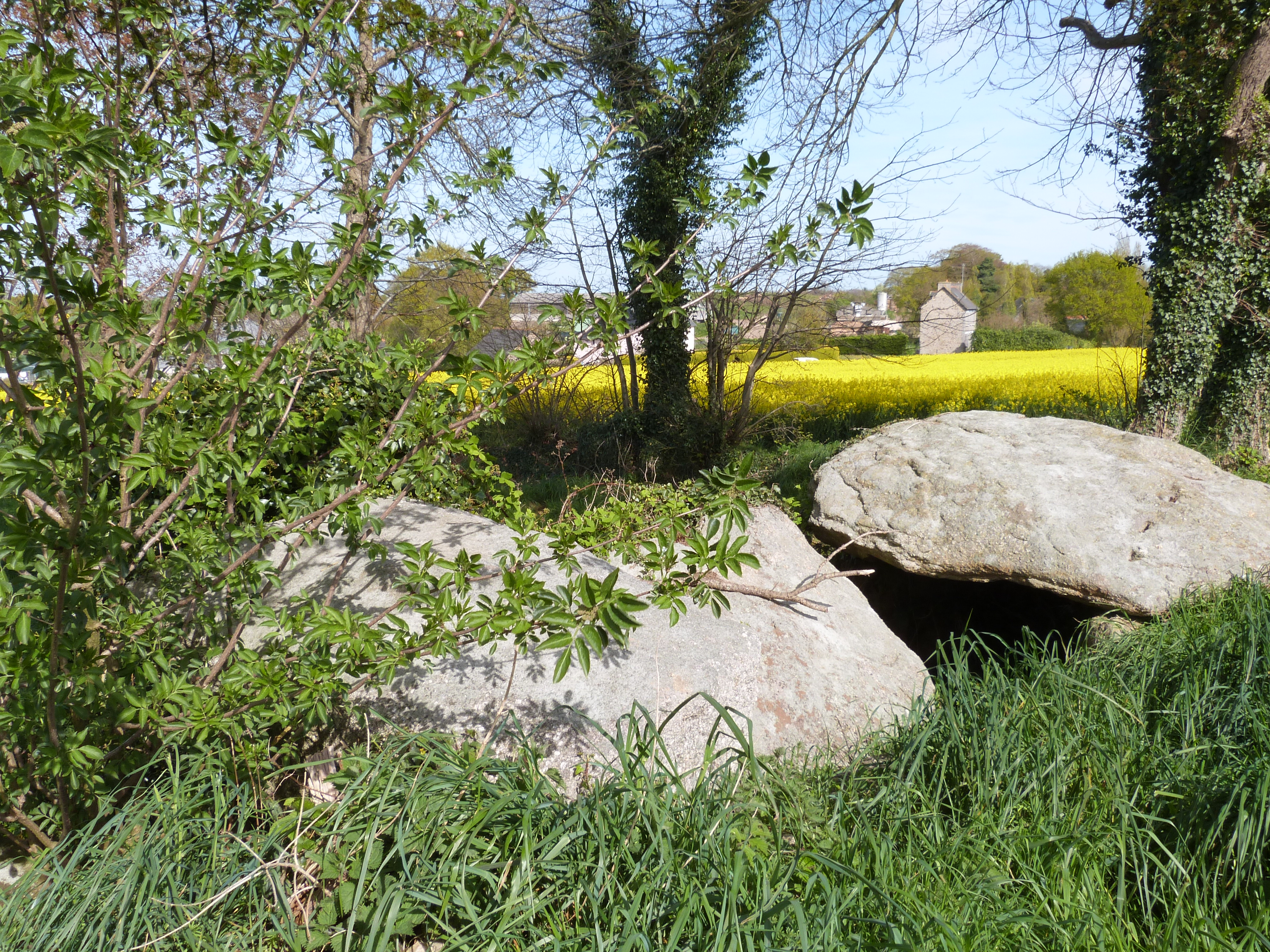 Deux des dalles de l'allée couverte de l'Epine située au Gouray (Côtes-d'Armor)